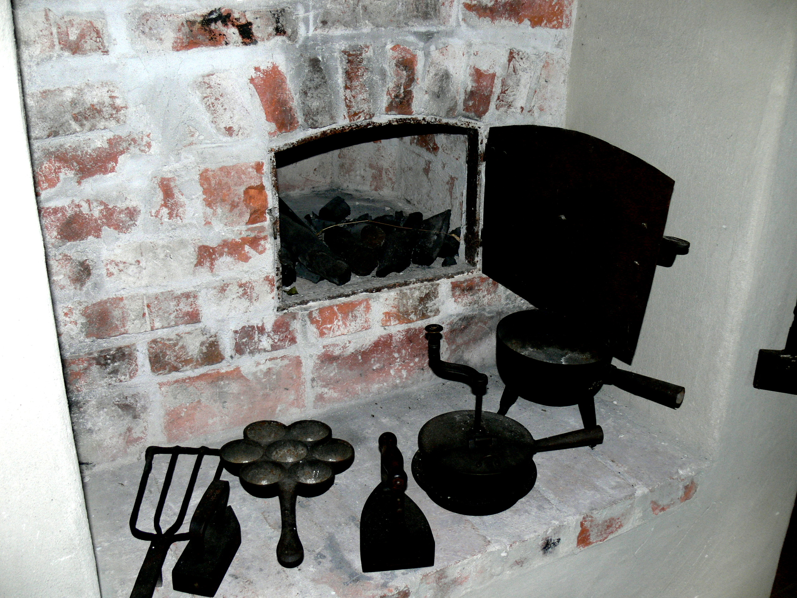 Bunge Museum auf Gotland. Bootsmannshaus ( 19.Jhdt. ): Ofen in der Küche